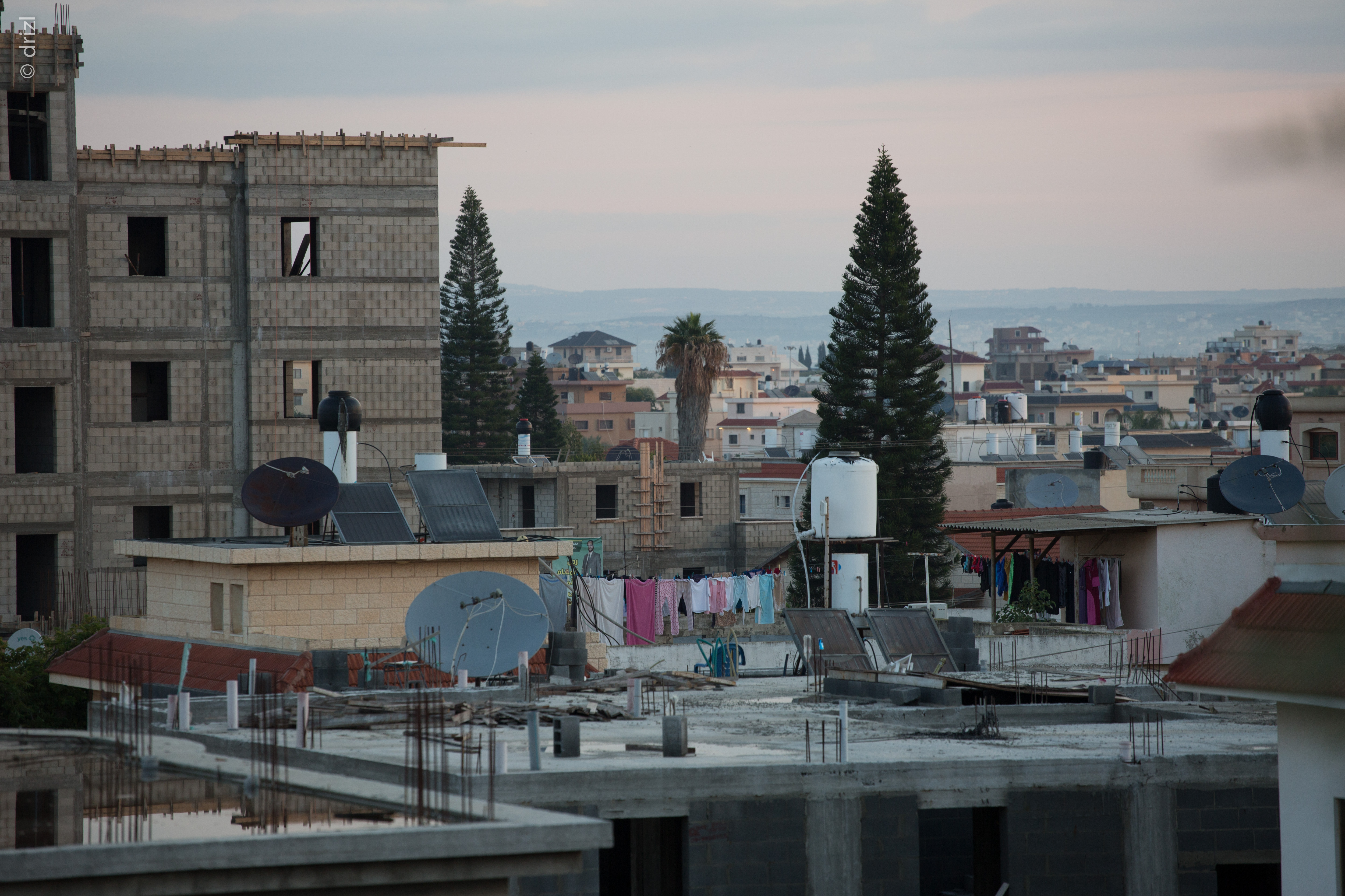 potsdam-9.jpg Tira Israel